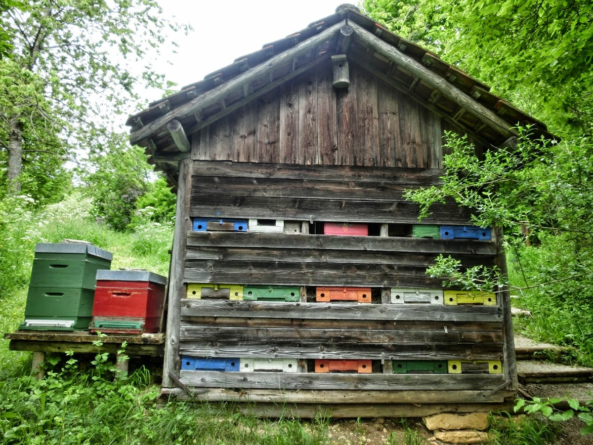 Deutschland - Baden-Württemberg - Landkreis Tuttlingen - Neuhausen ob Eck: Freilichtmuseum - Bienenhaus